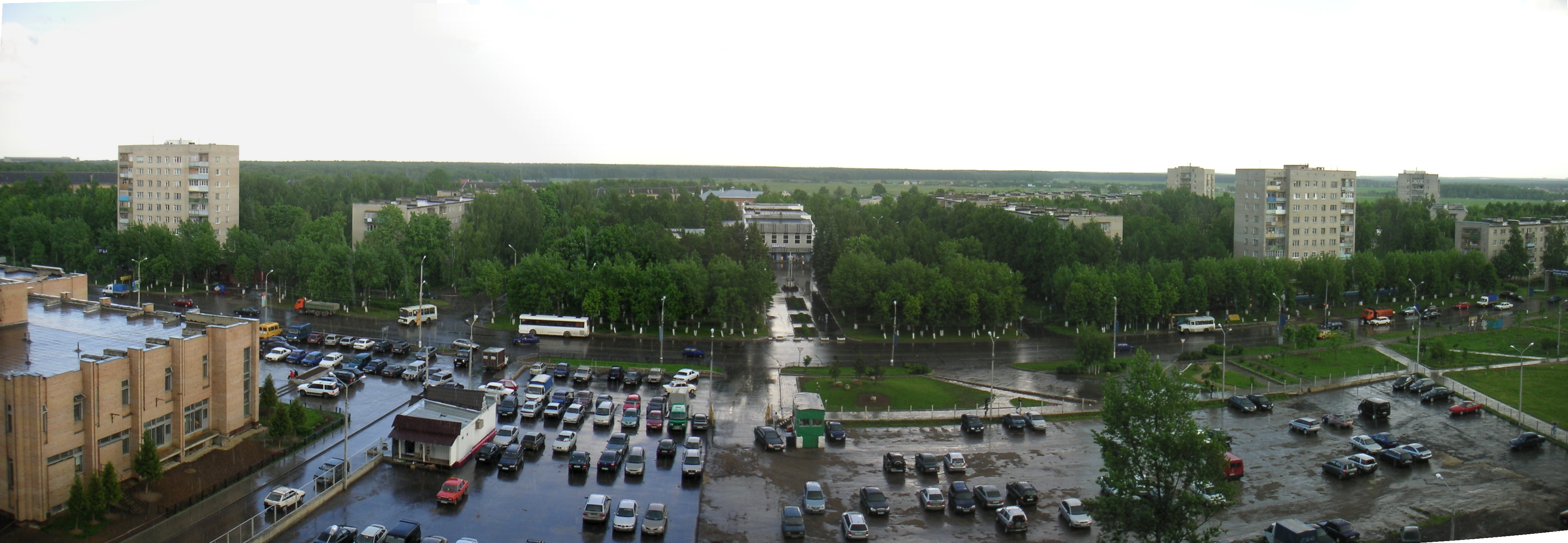 Панорама микрорайона «Авиационный» в Домодедове.